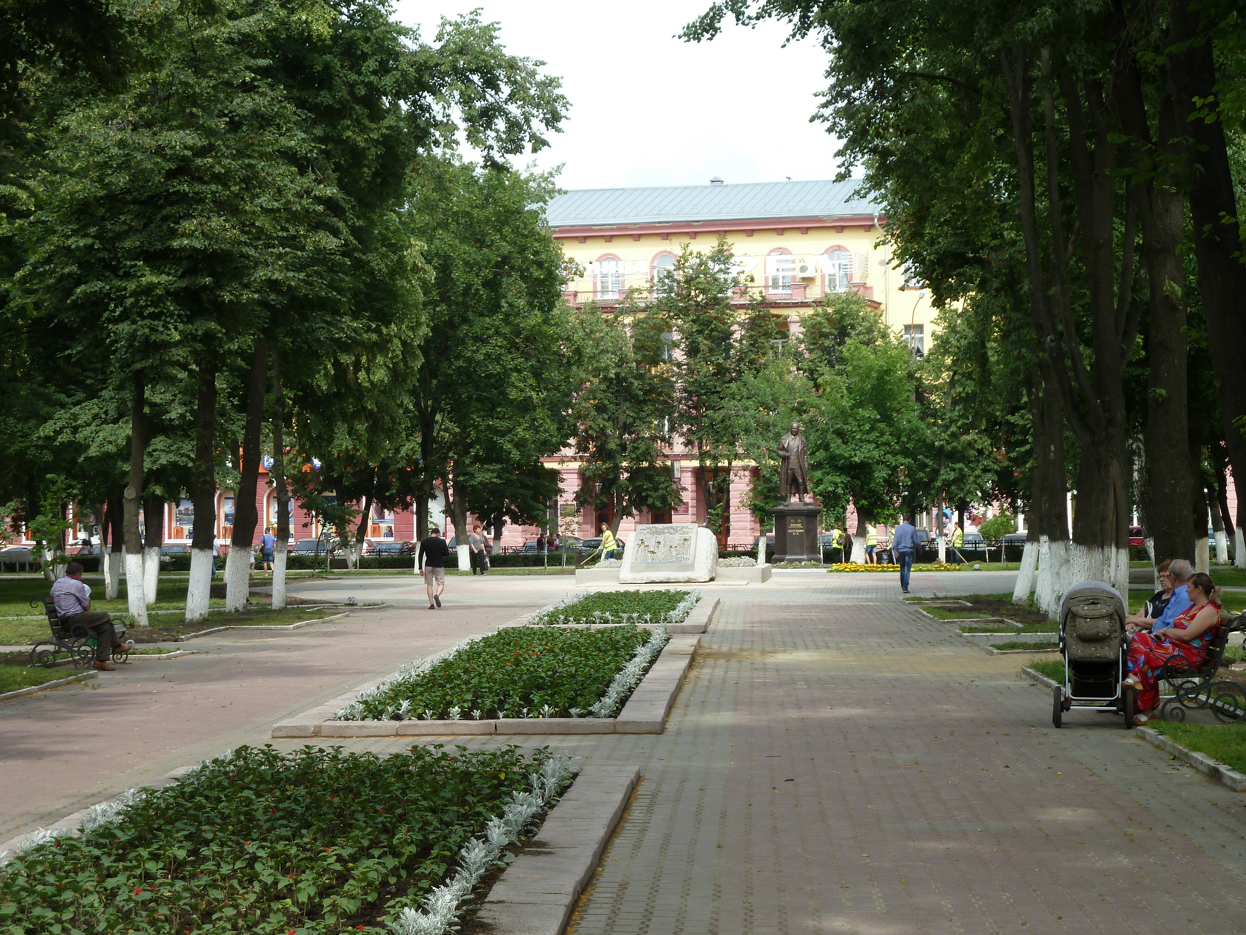 Центральная аллея сквера